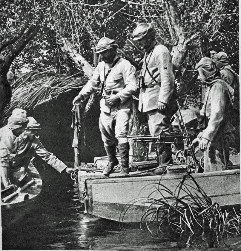 extrait du journal, page 1.